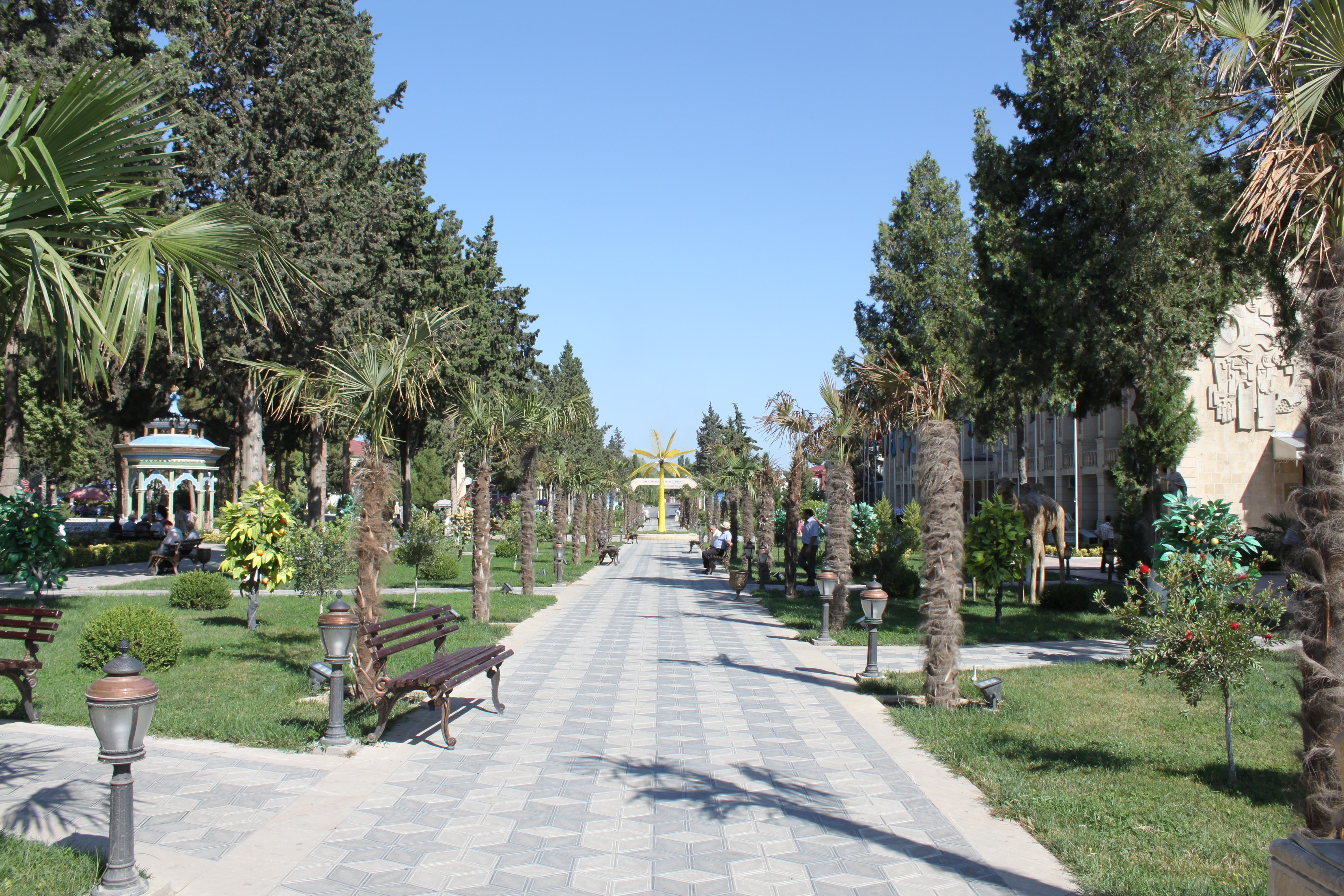 Парк в Хачмазе.